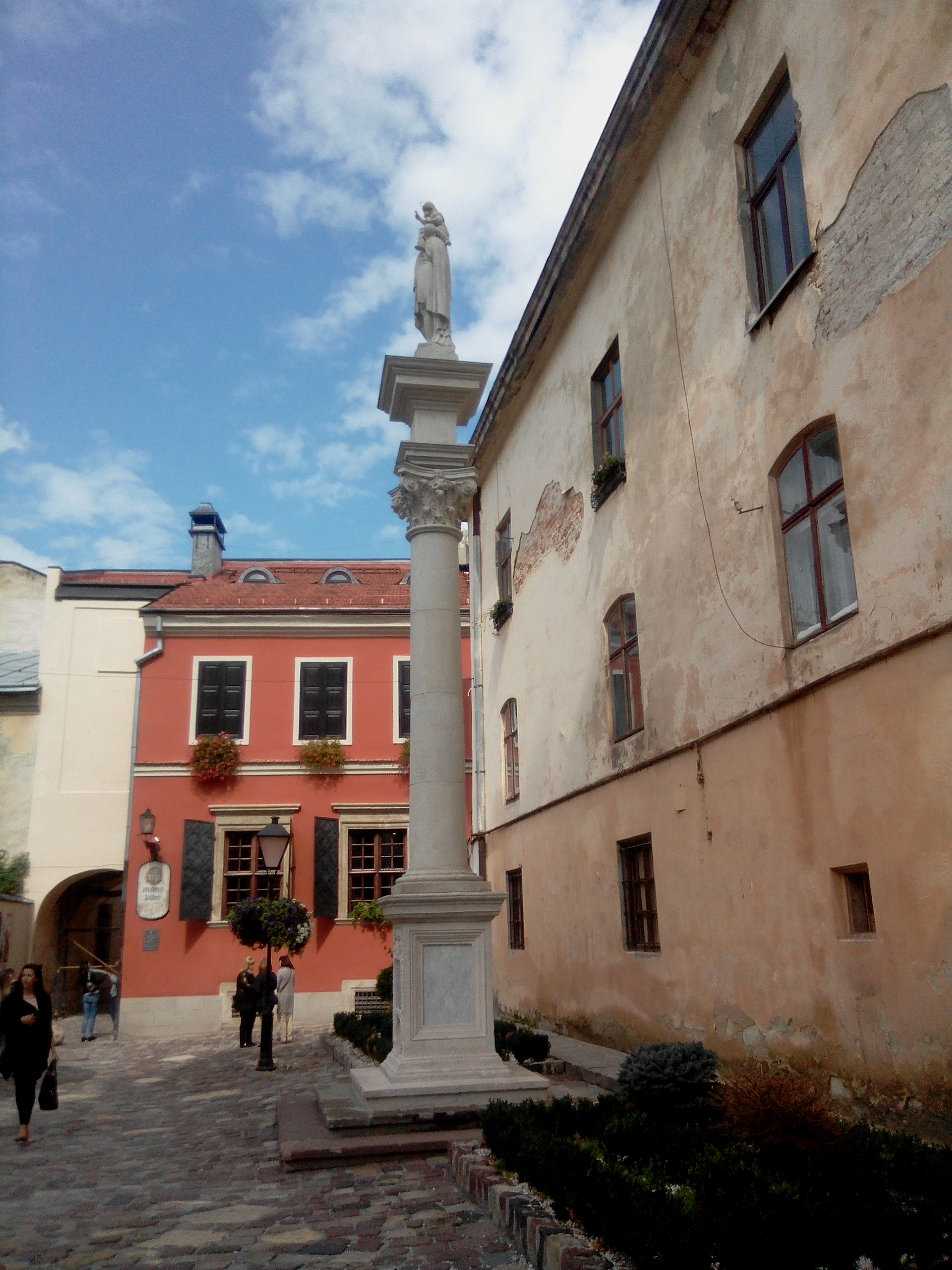 Вірменський собор - Колона Св. Христофора, Львів, Вірменська вул., 7/9